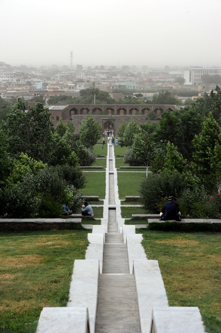 Inside the Babur Gardens in Kabul, Afghanistan.